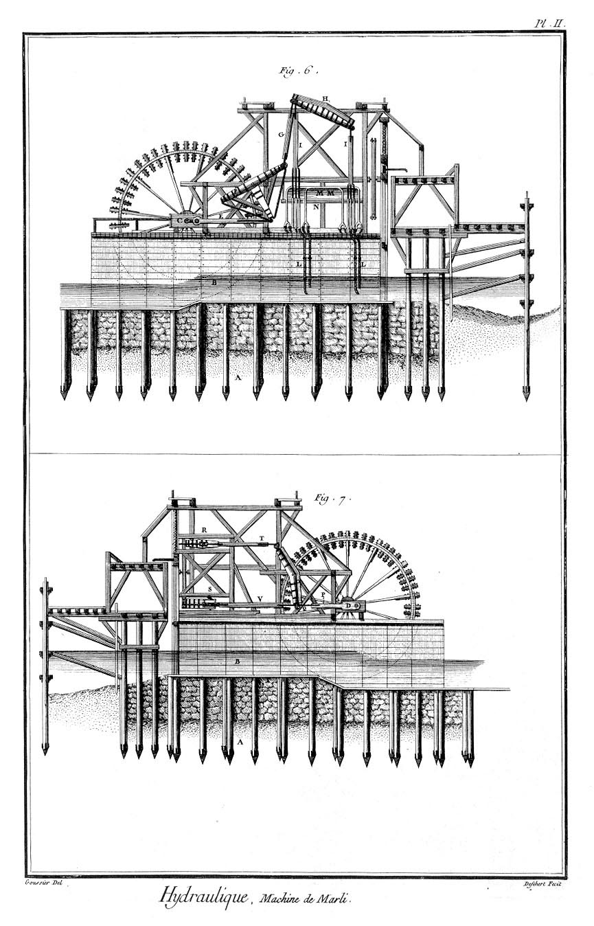 Hydraulique, Machine de Marli, Pl 2